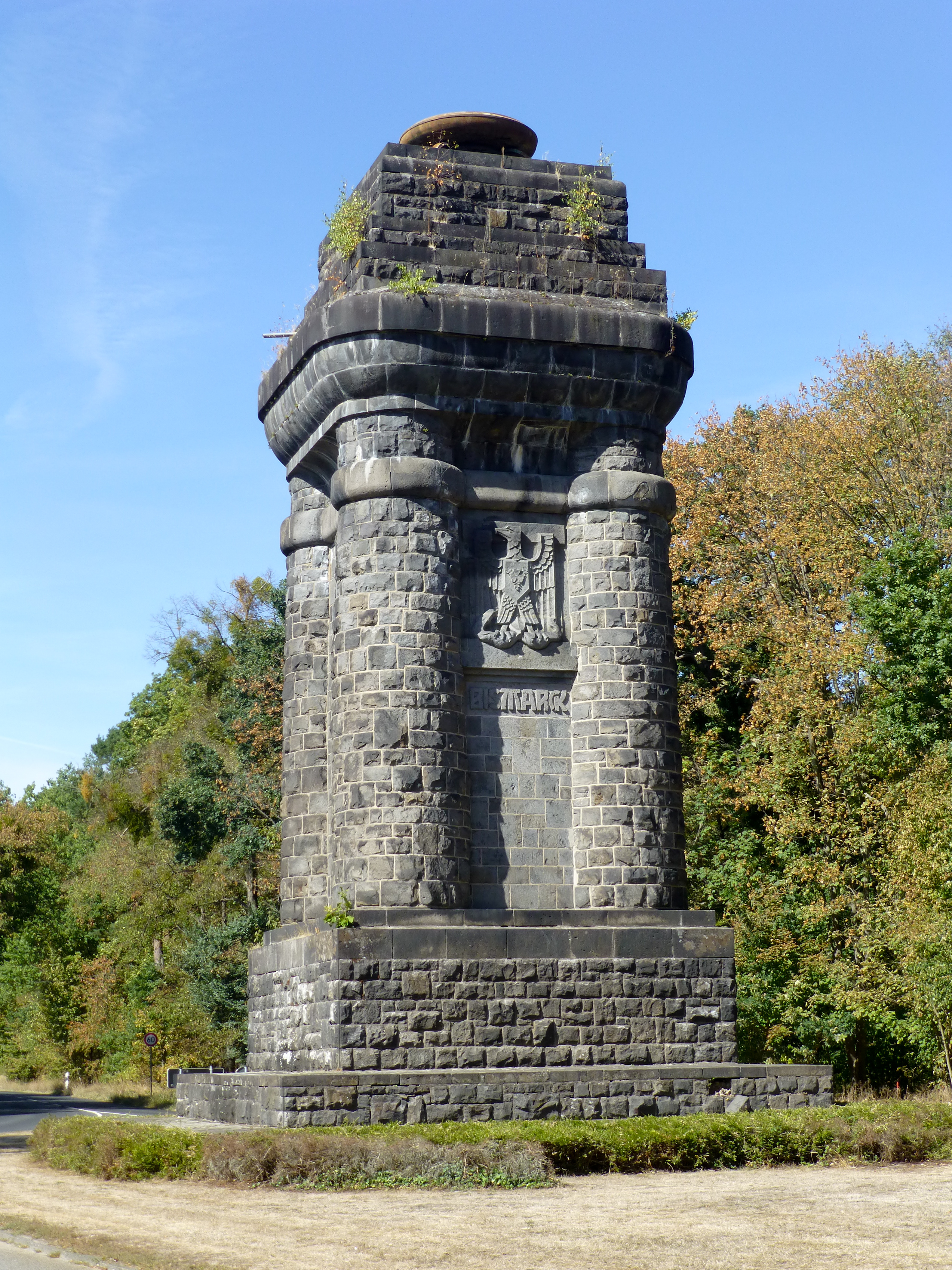 Bismarckturm in Hanau; Ansicht von Osten